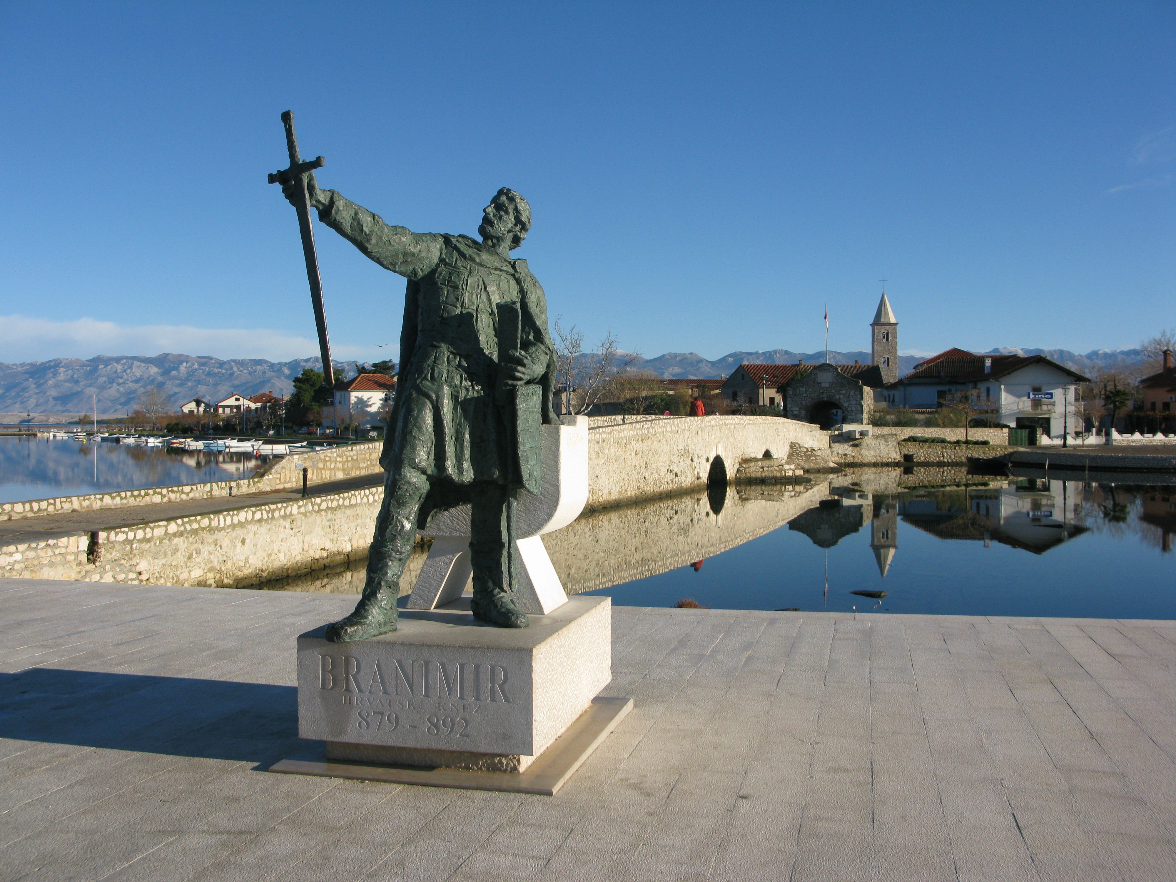 Pogled na kip kneza Branimira